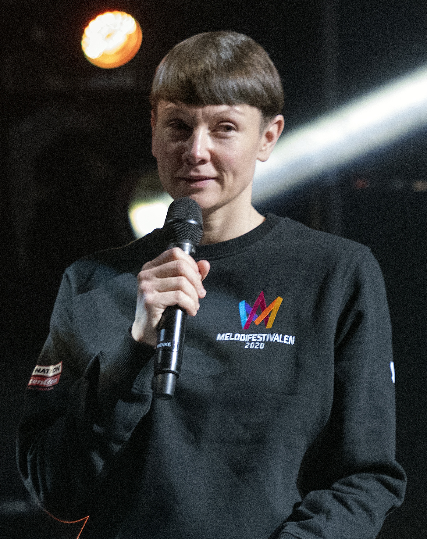 Christer Björkman Karin Gunnarsson festivalgeneraler Melodifestivalen 2020 Linköping prresskonferens